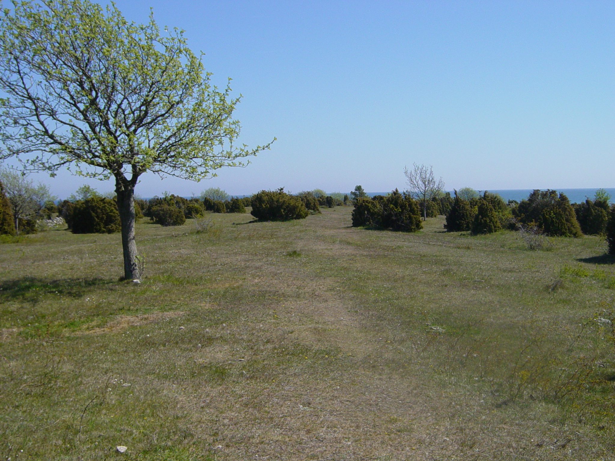 Uppe på höjdryggen med Östersjön i bakgrunden.